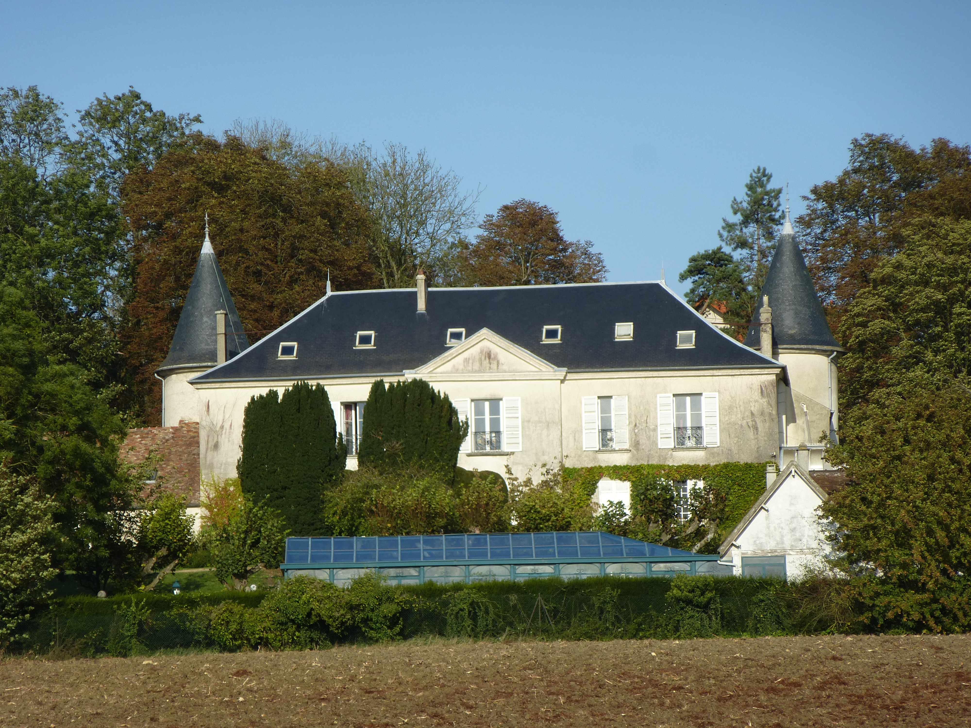 Château de Monthyon. (Seine-et-Marne, région Île-de-France).